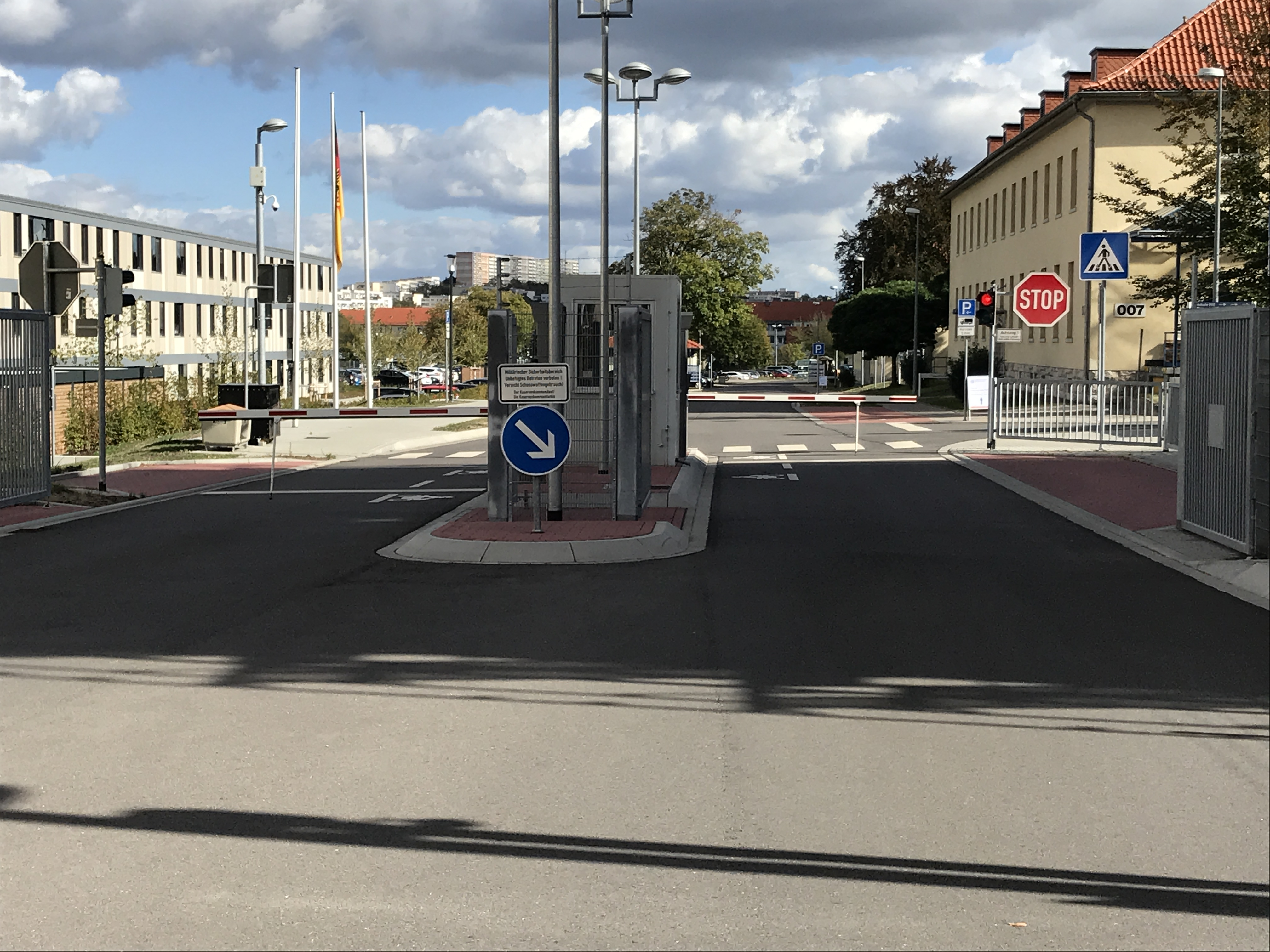 Eingangsbereich der Löberfeldkaserne in Erfurt.